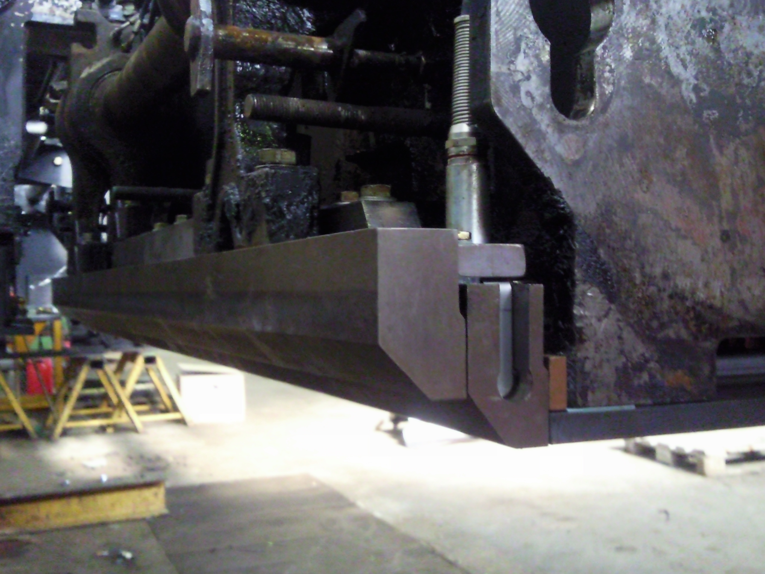 Doppeltamper einer ABG Variobohle eines 7820. Im hinteren Tamper sitzt der Heizstab.